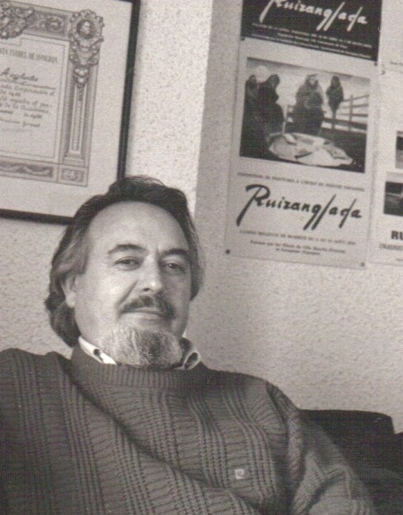 Ruizanglada 1988